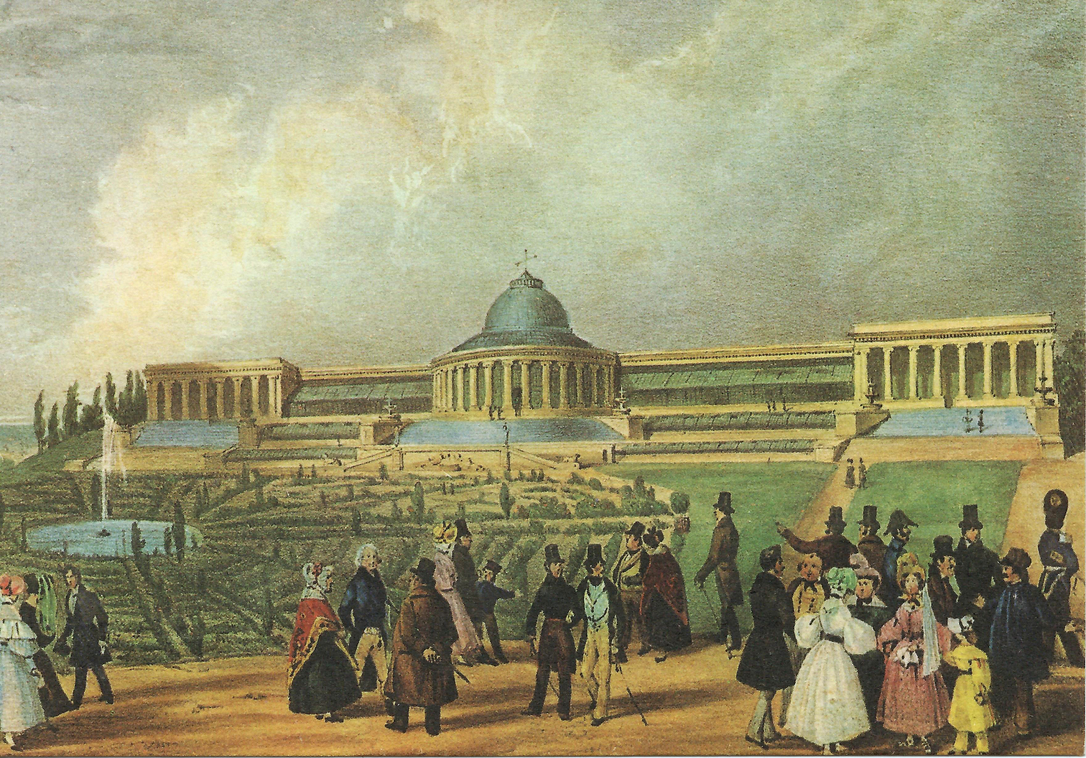 De Kruidtuin geschilderd door Henri Borremans